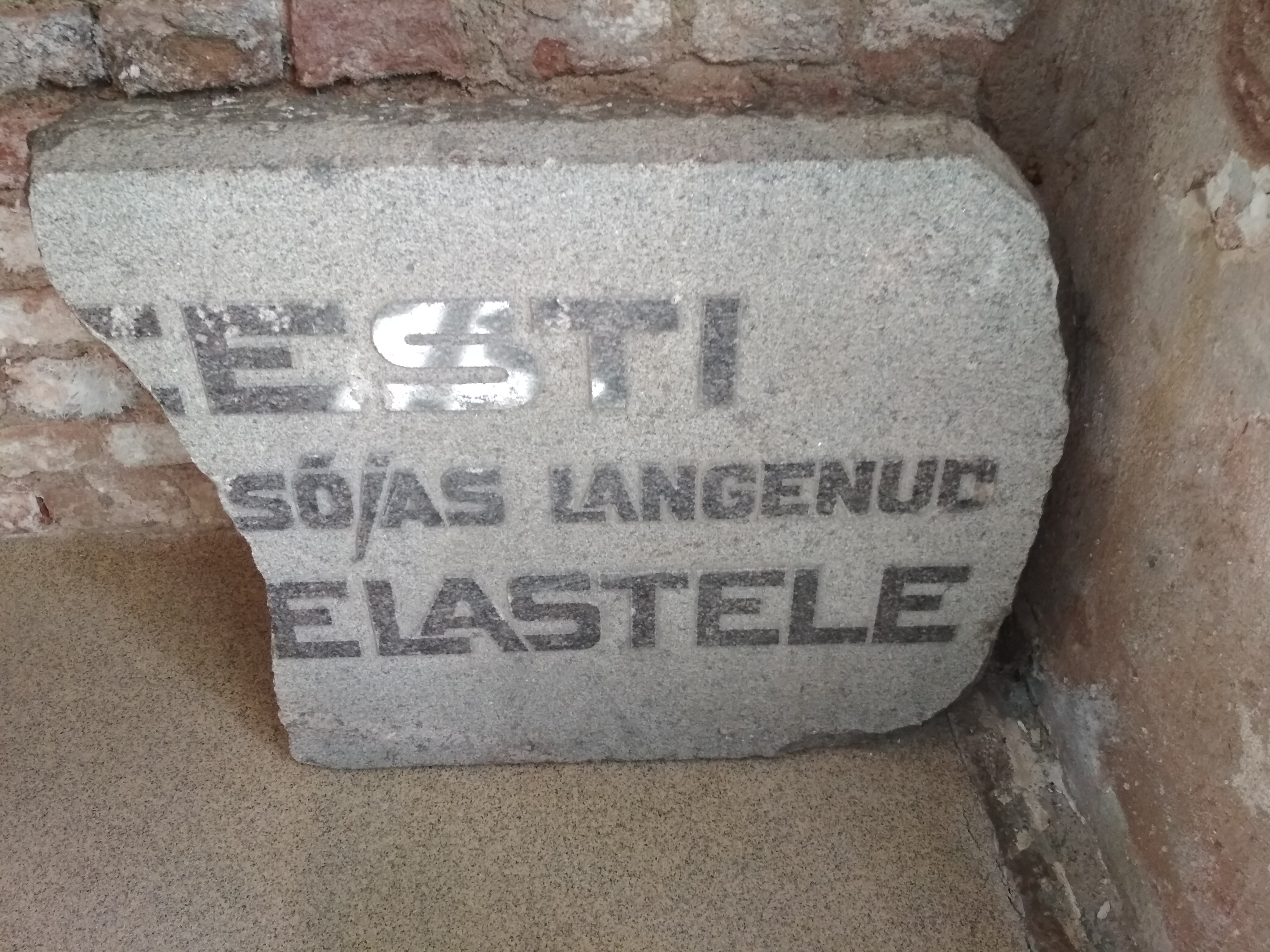 1945. aastal õhku lastud Pärnu Vabadussõja monumendi graniittahvli tükk Pärnu muuseumis